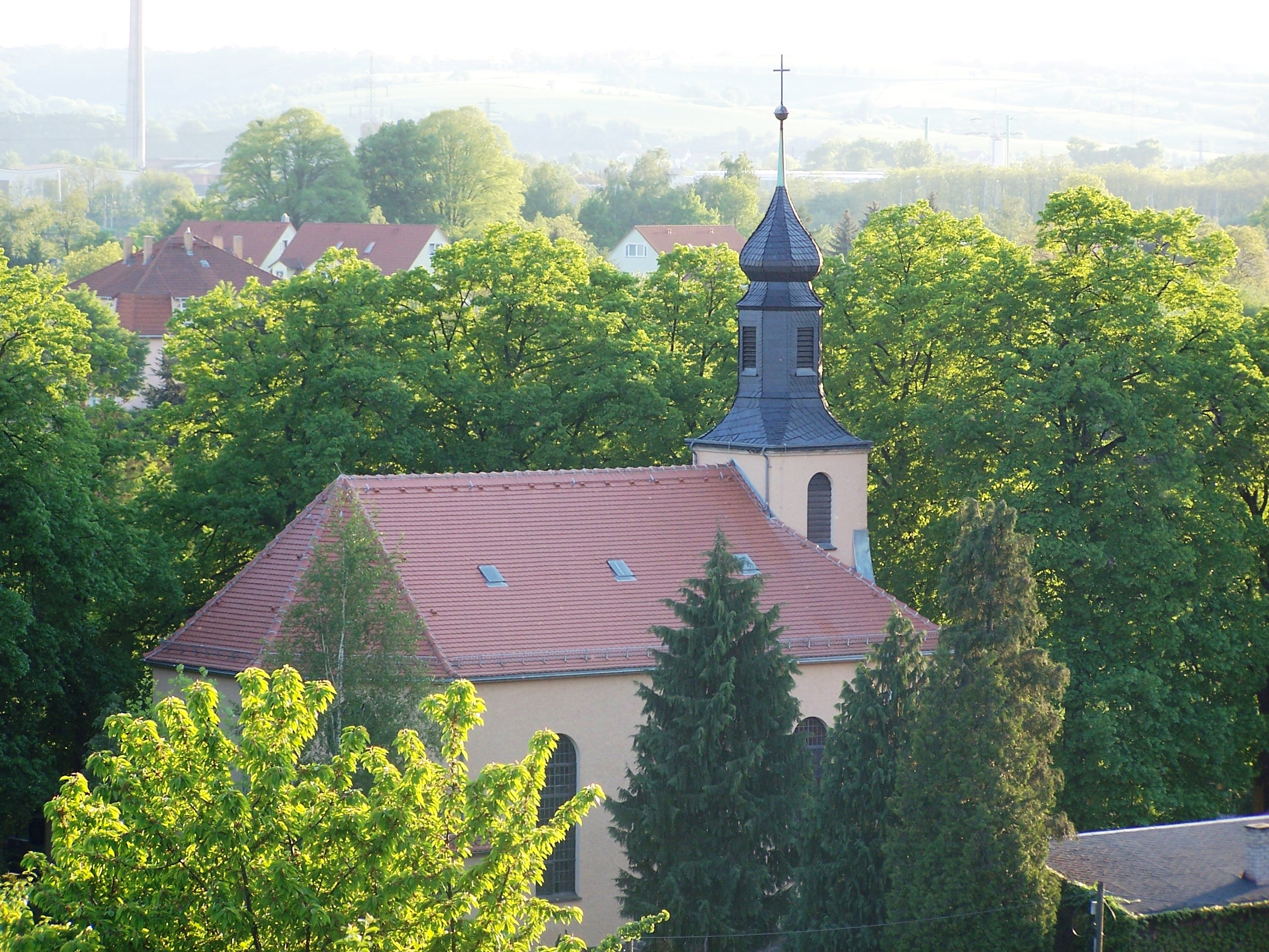 Johanneskapelle in Radebeul-Zitzschewig